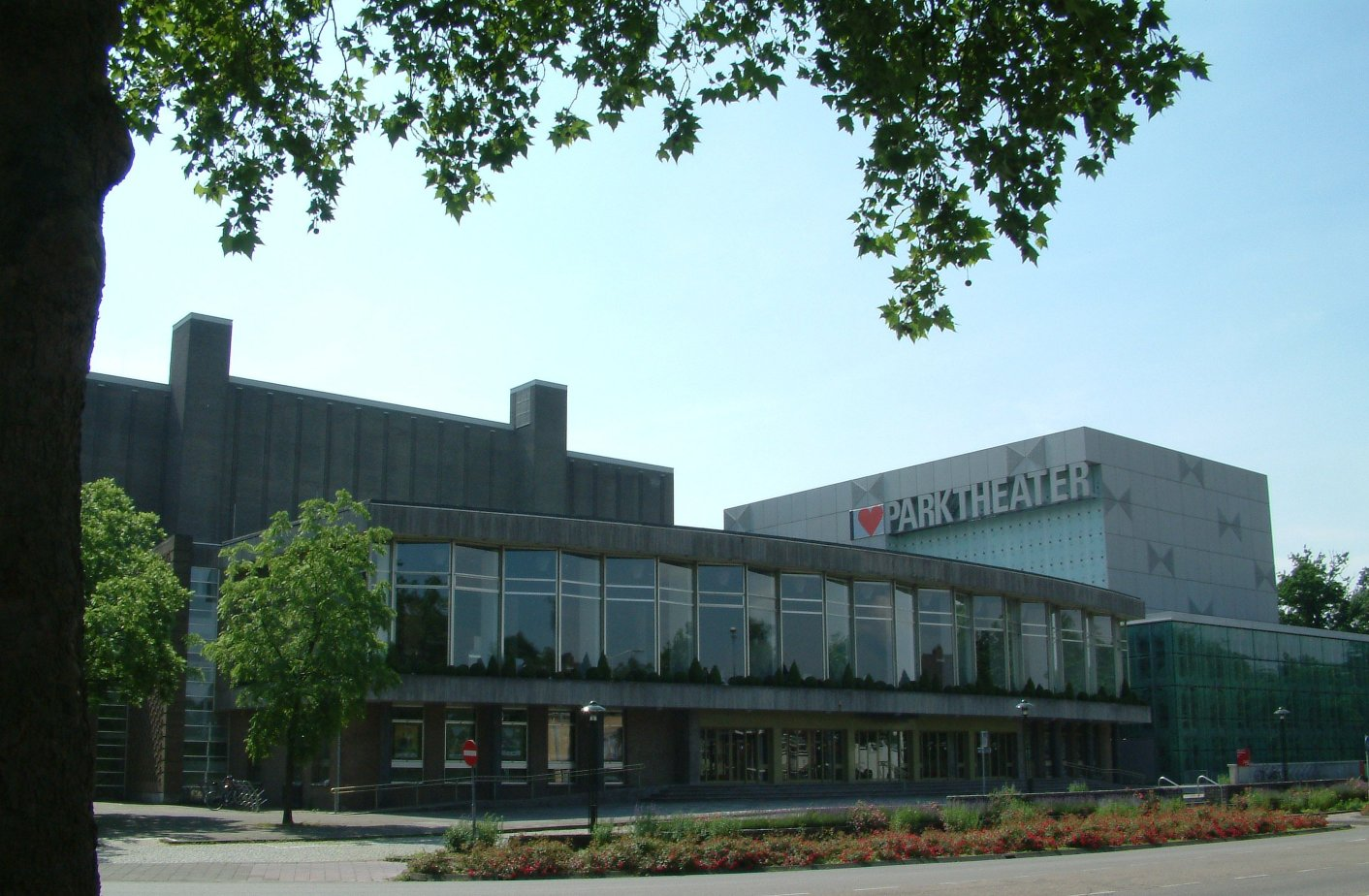 Schouwburg Eindhoven, officiële benaming Parktheater.